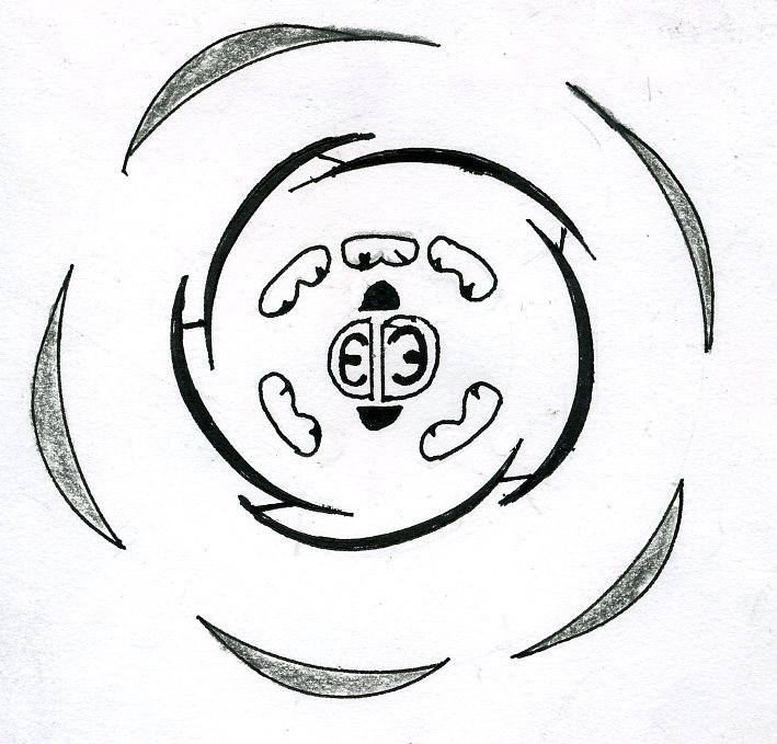 bloemdiagram Smeerwortel (Symphytum), Symphytum floral diagram